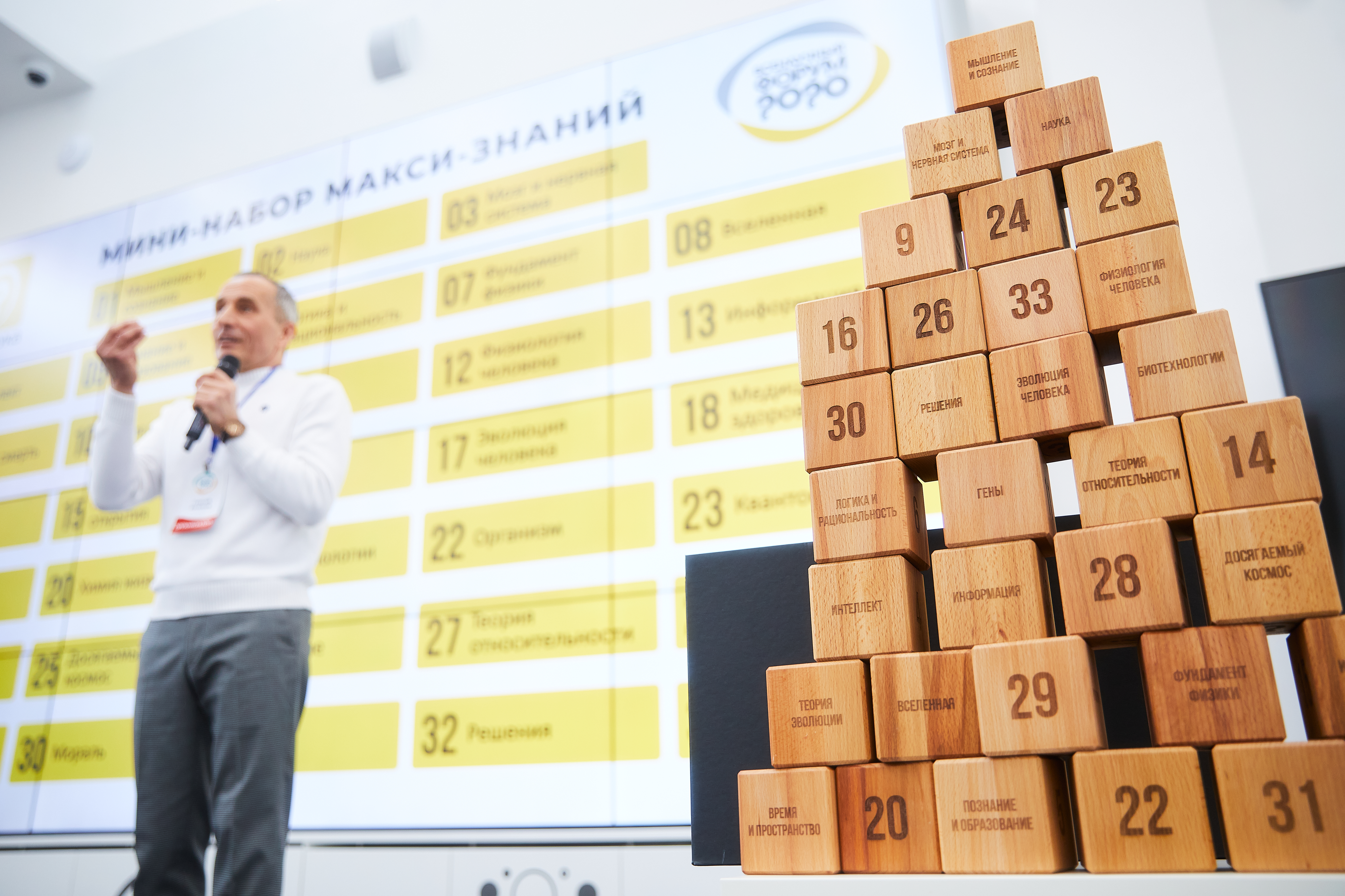 Публикация «мини-набора макси-знаний» — наиболее важных темы современной научной картины мира на церемонии «Открываем чёрный ящик». [ Всенаучный форум 2020] 16 февраля 2020 года